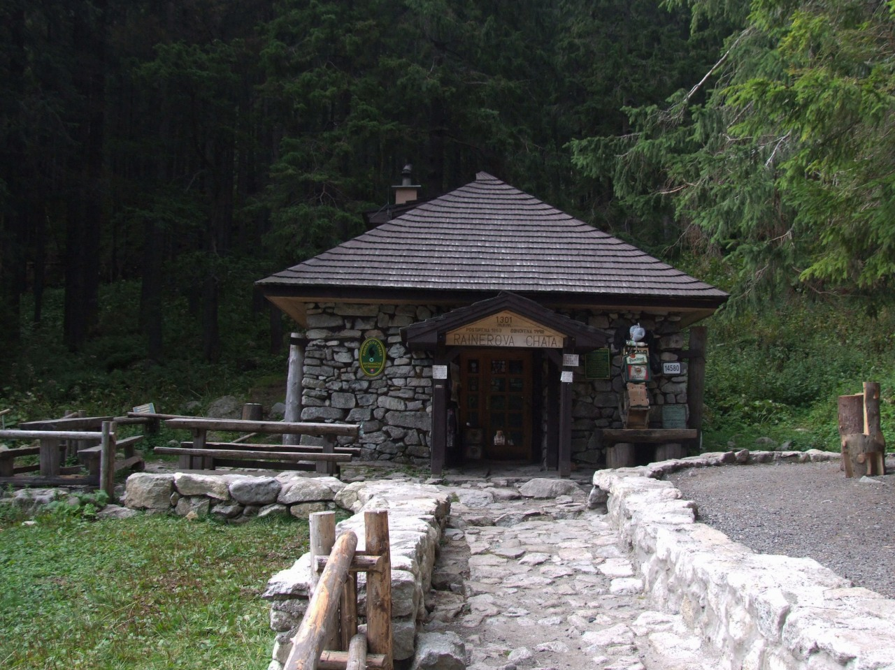 Rainerowa Chata (Tatry Wysokie)